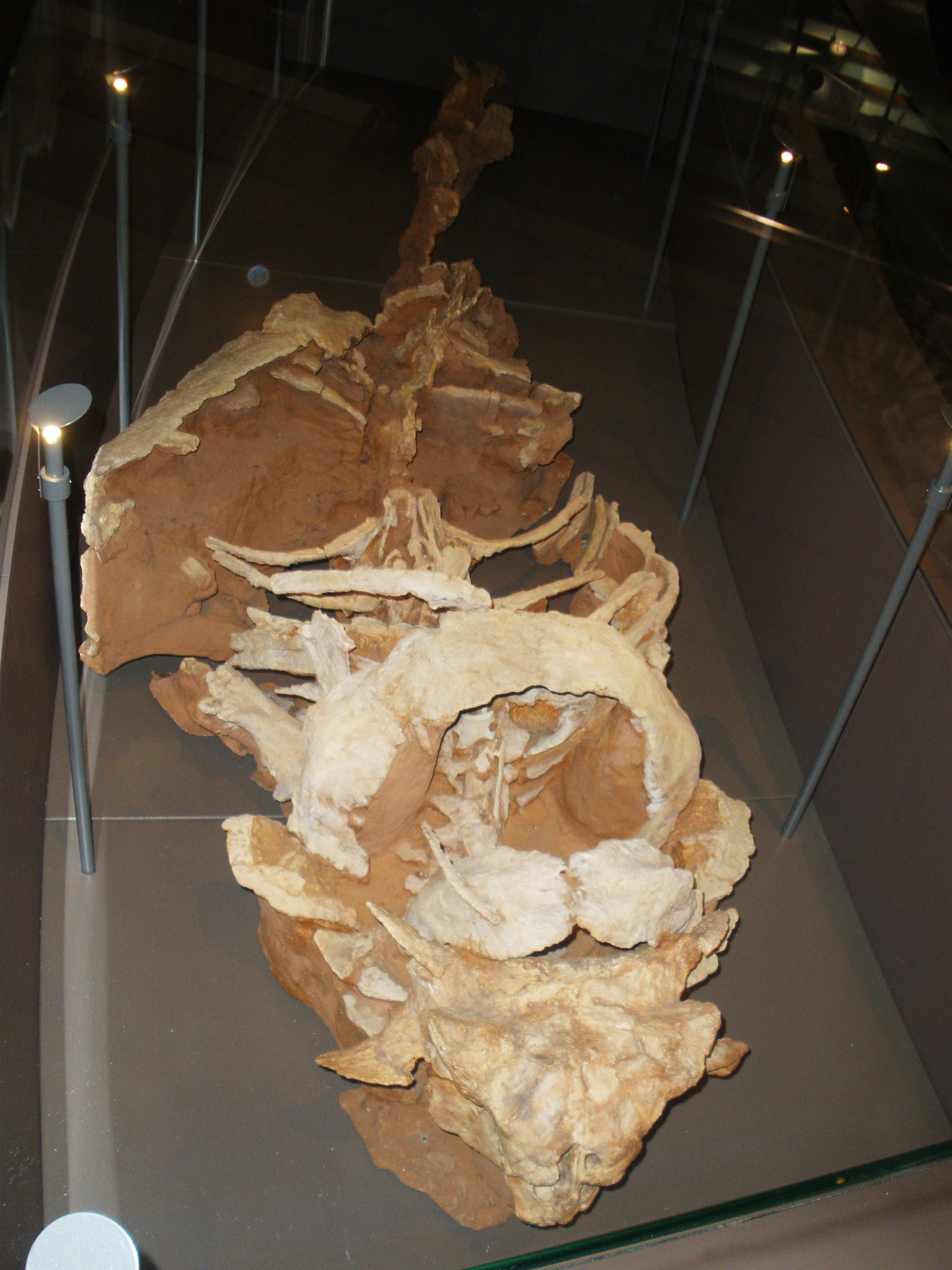 Fossil of Pinacosaurus, an ankylosaurian dinosaur Took the photo at Musee d'Histoire Naturelle, Brussels